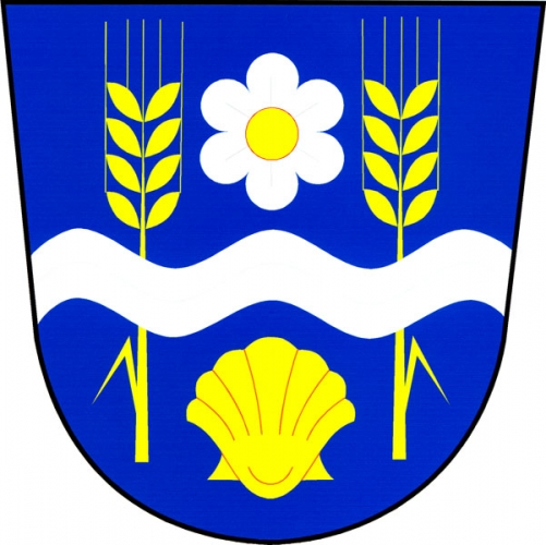 znak, Odunec, okres Třebíč